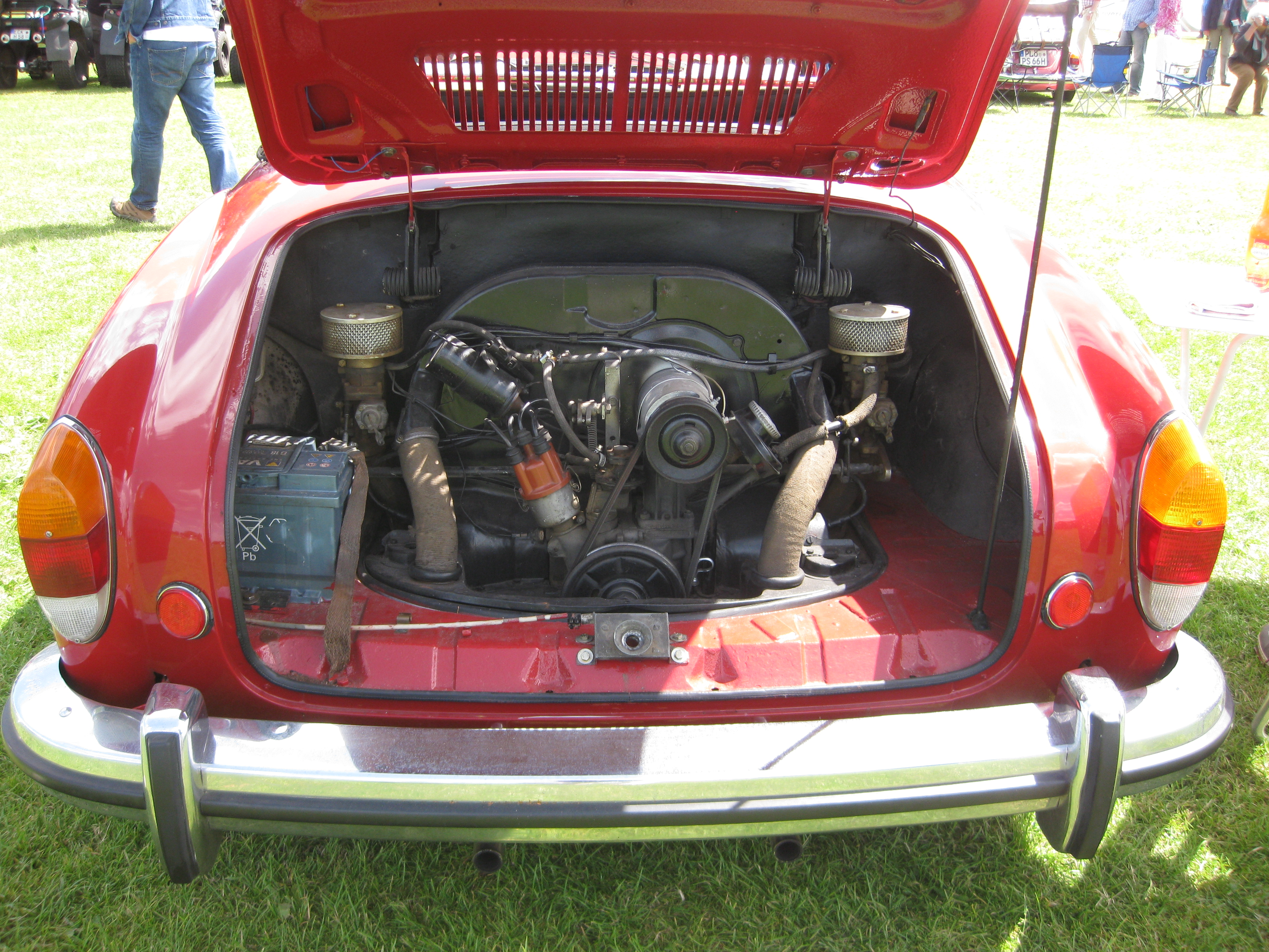 VW Karmann Ghia Typ 14 - Blick in den Motorraum